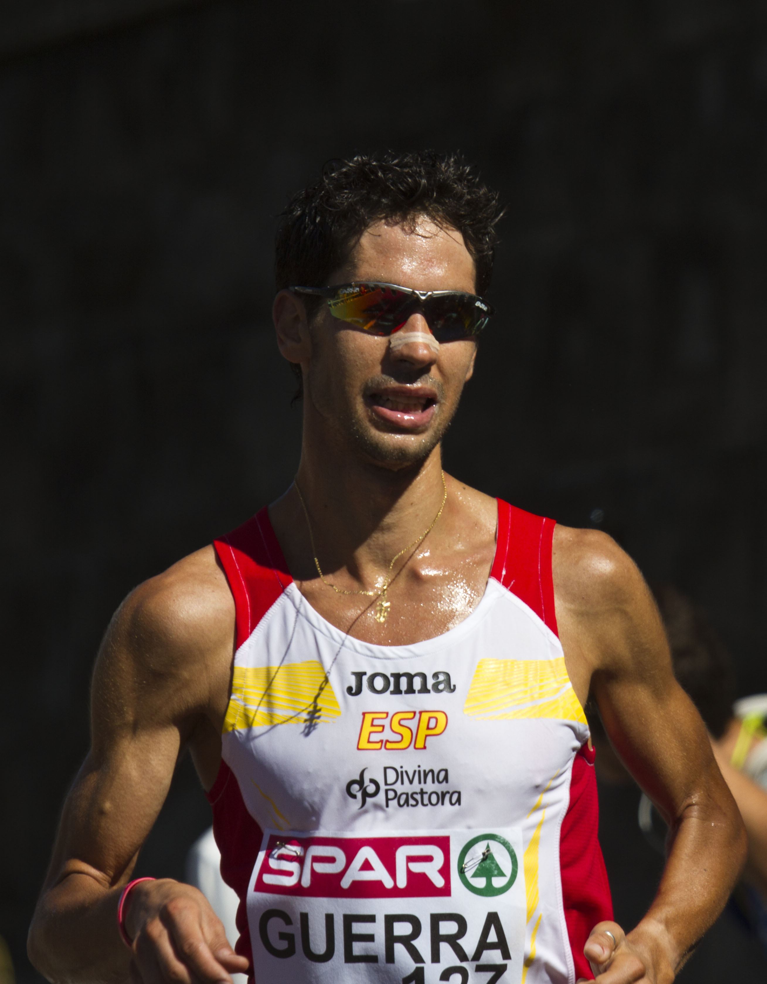 990481 marathon guerra 4e